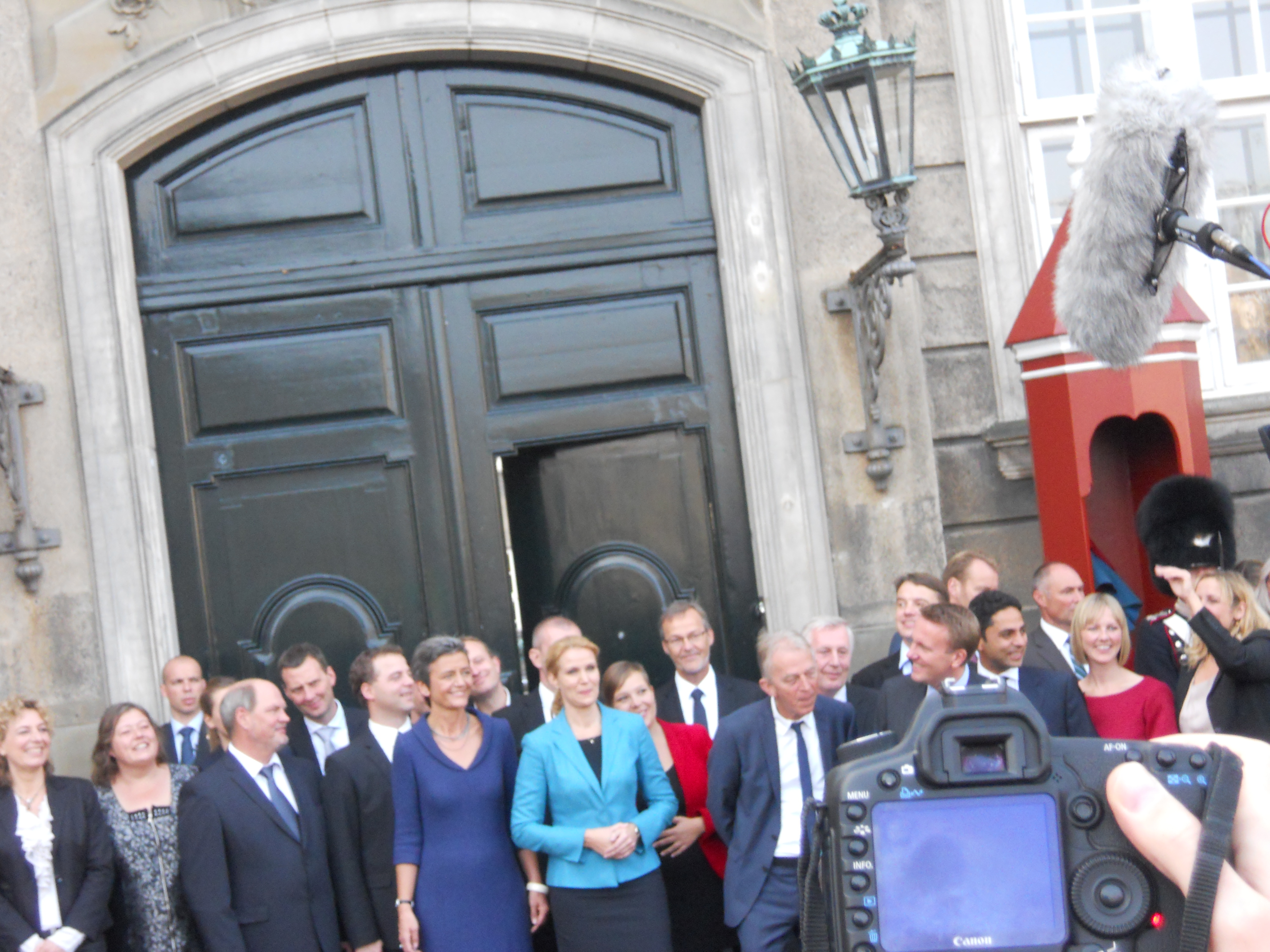 Regeringen Helle Thorning-Schmidts tiltrædelse.